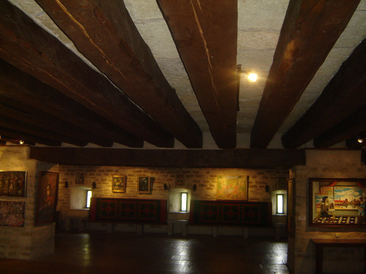 Purtse vasallilinnuse teise korruse saal